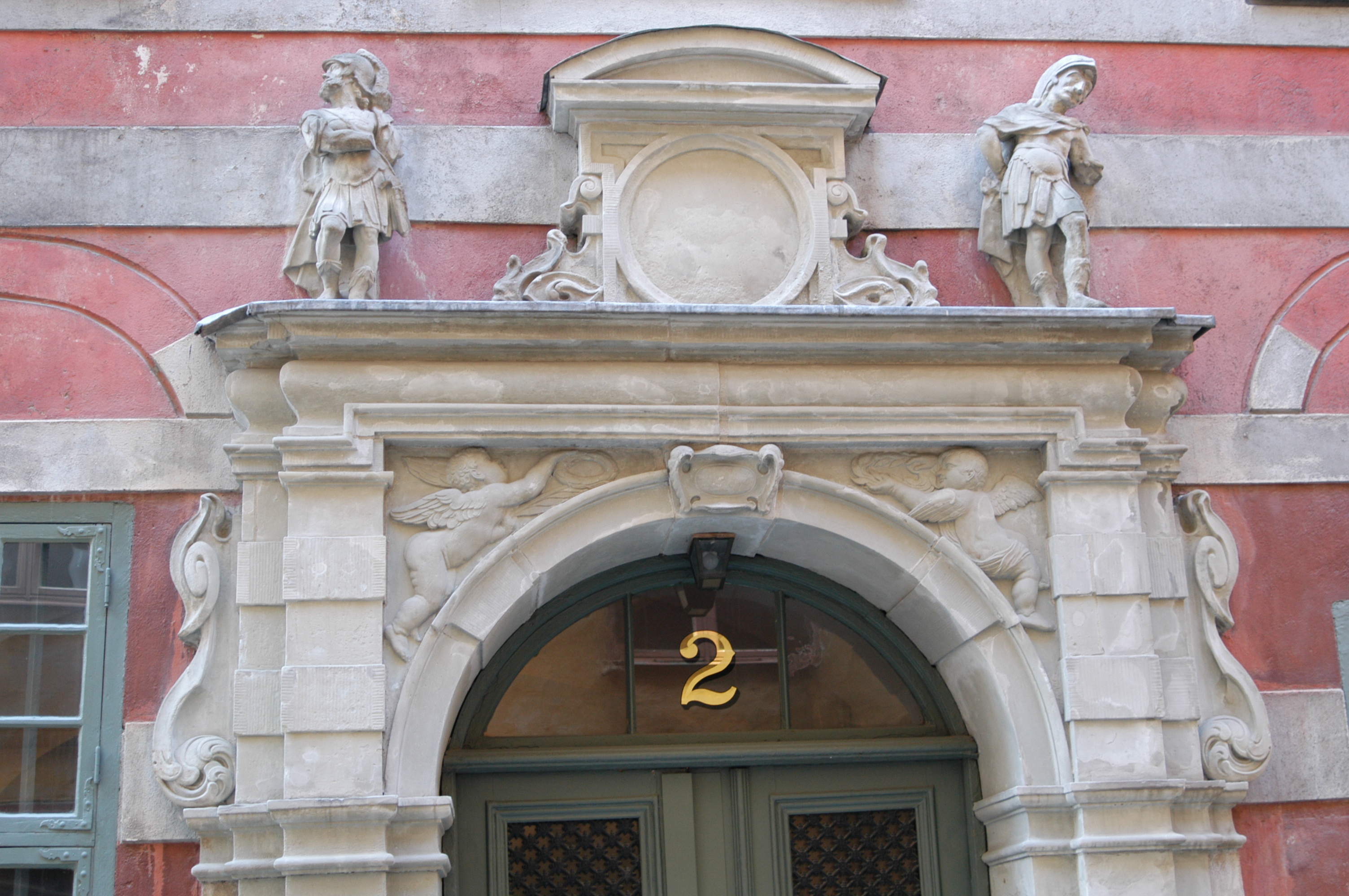 Bartelska husets portal av stenhuggaren Johan Wendelstamm (död 1670).